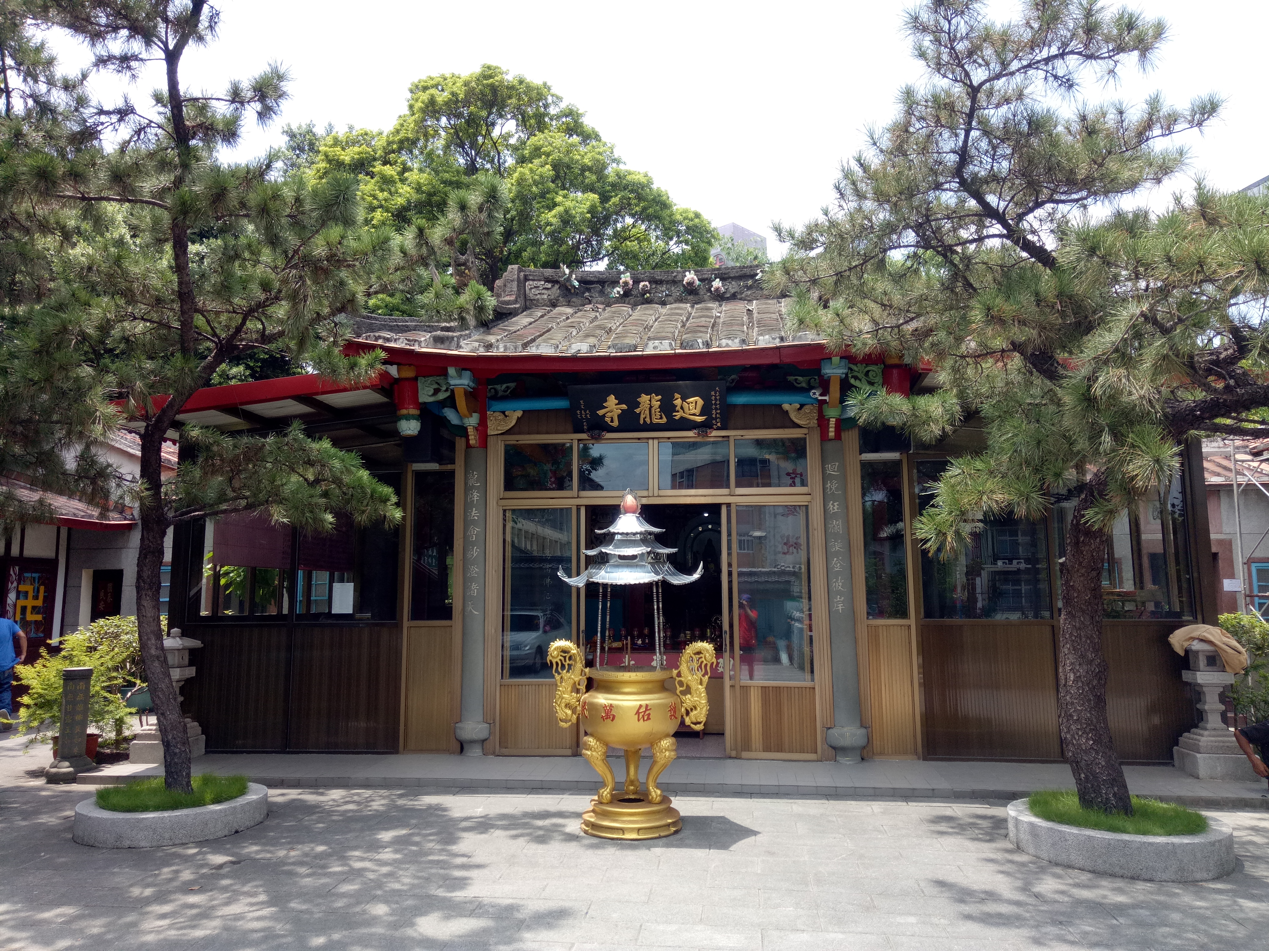 迴龍寺，位於台灣桃園市龜山區，主祀釋迦牟尼佛，配祀觀音菩薩、文殊菩薩、普賢菩薩；信眾多半分布於迴龍、新莊一帶。